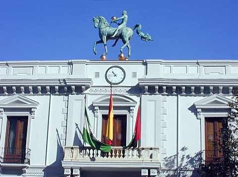 Fotografía del Ayuntamiento de Granada